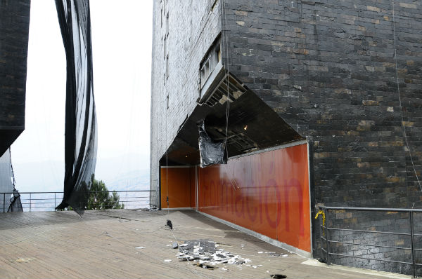 Parque Biblioteca España presento daño tras humedad en sus fachadas flotantes